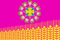 Флаг Кущёвского сельского поселения, Краснодарский край, Россия.